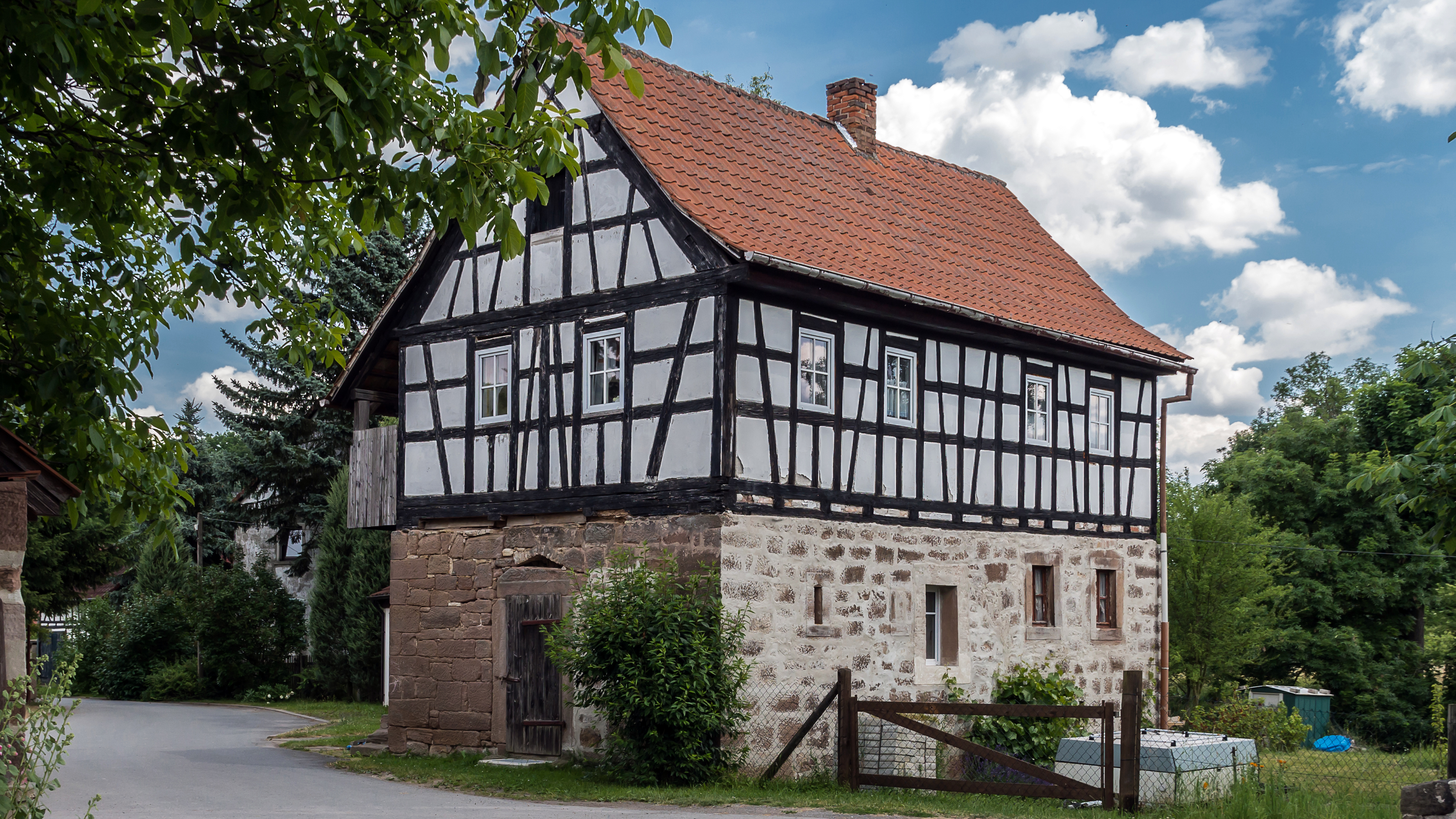 Kulturdenkmal in Uhlstädt-Kirchhasel Gemeinde Röbschütz,ehemaliges Gemeindehaus